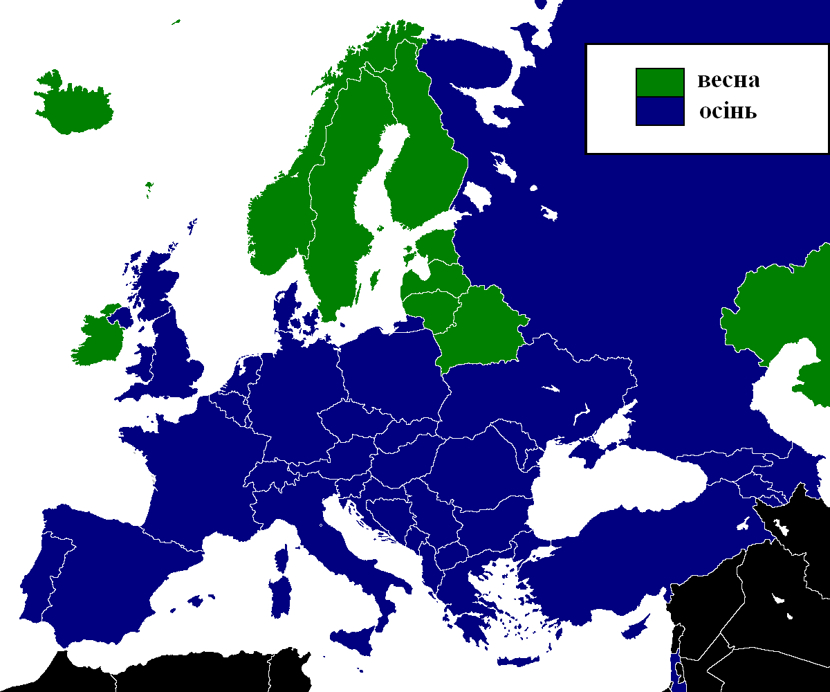 Українська. Карта найвищих ліг членів УЄФА за періодом початку сезону English. UEFA top leagues by period of starting.